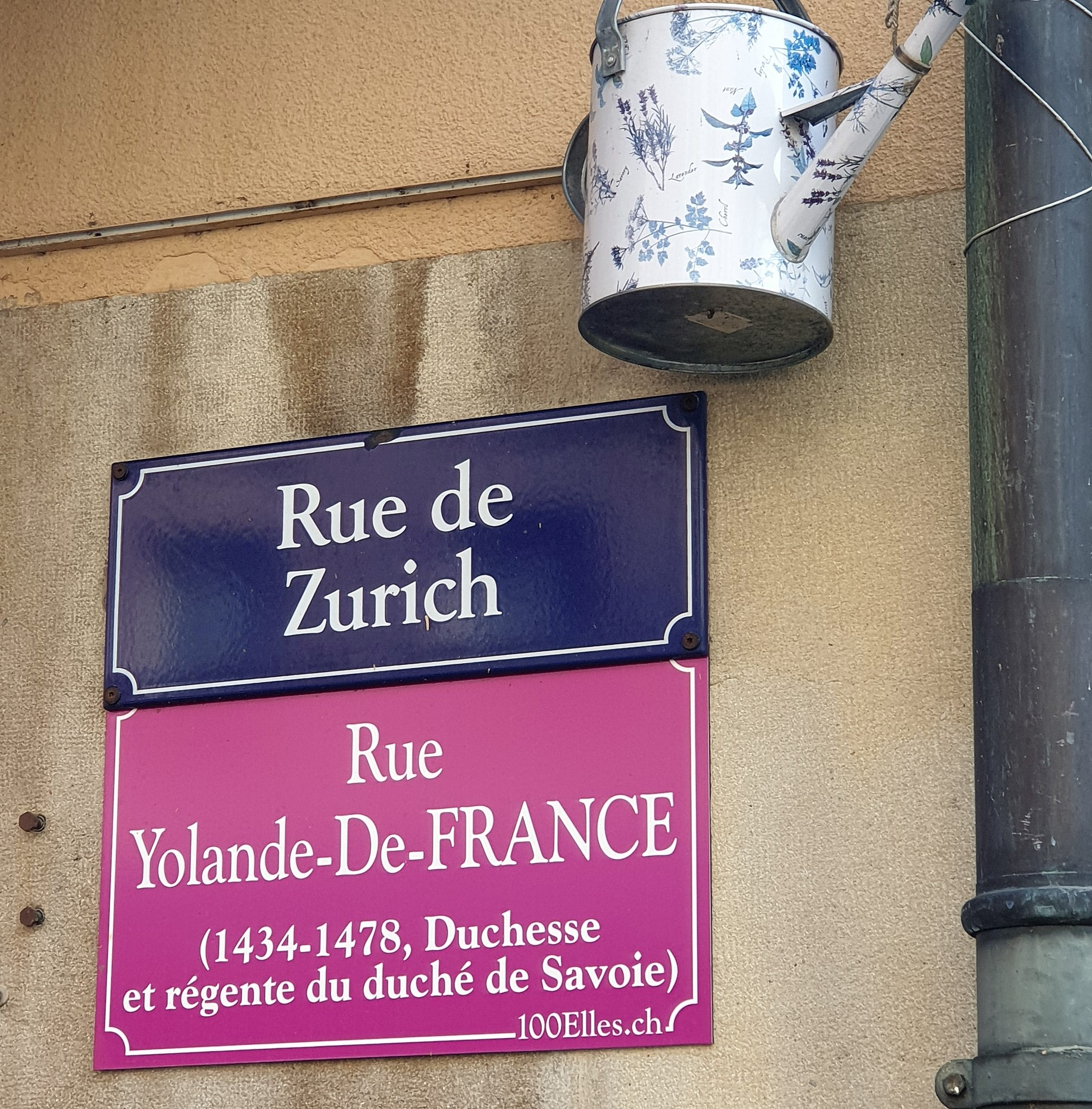 Plaque temporaire de rue apposée dans le cadre du projet 100elles à Genève en 2019